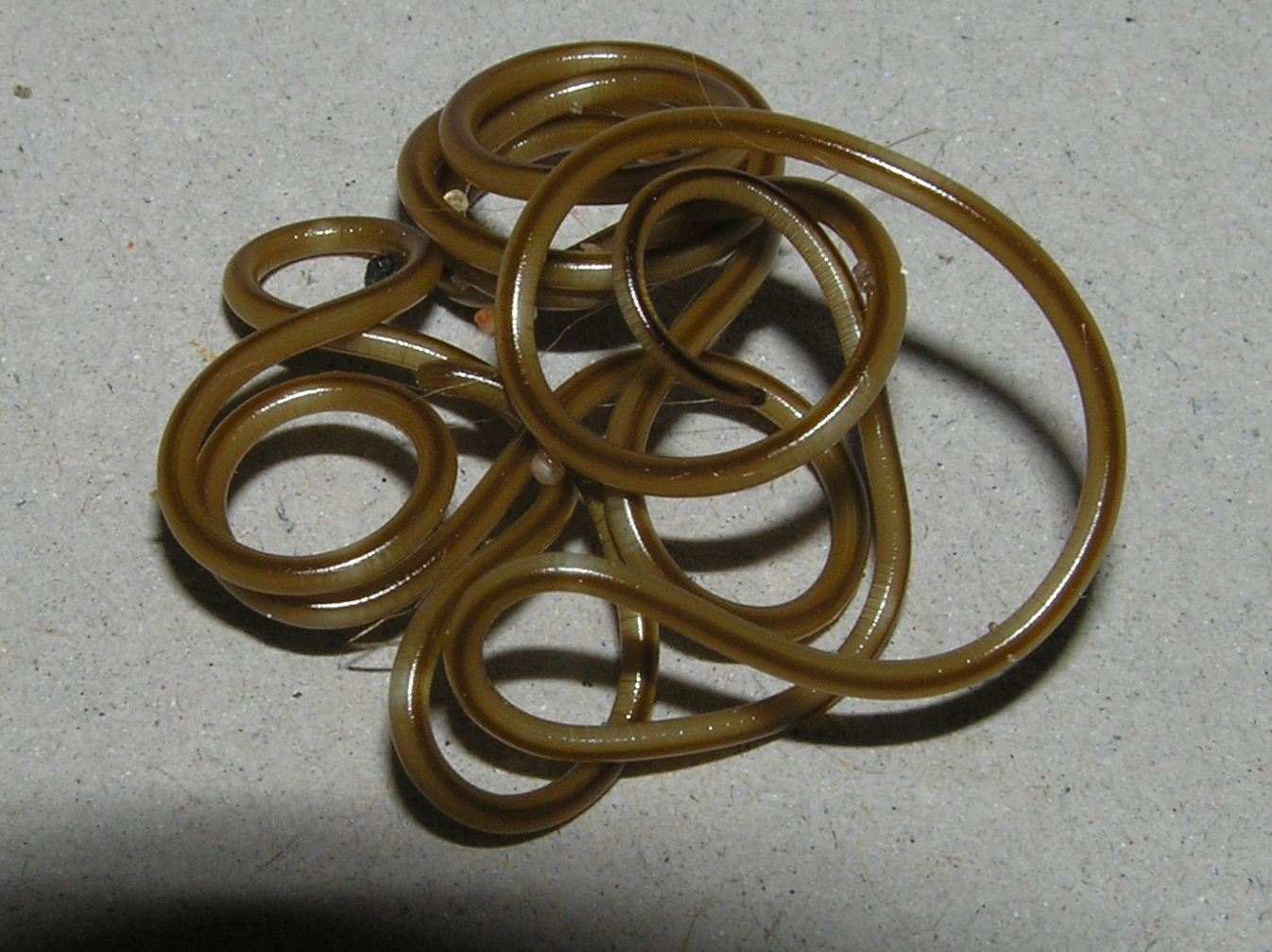 Mermis nigrescens; Białowieża, Polska